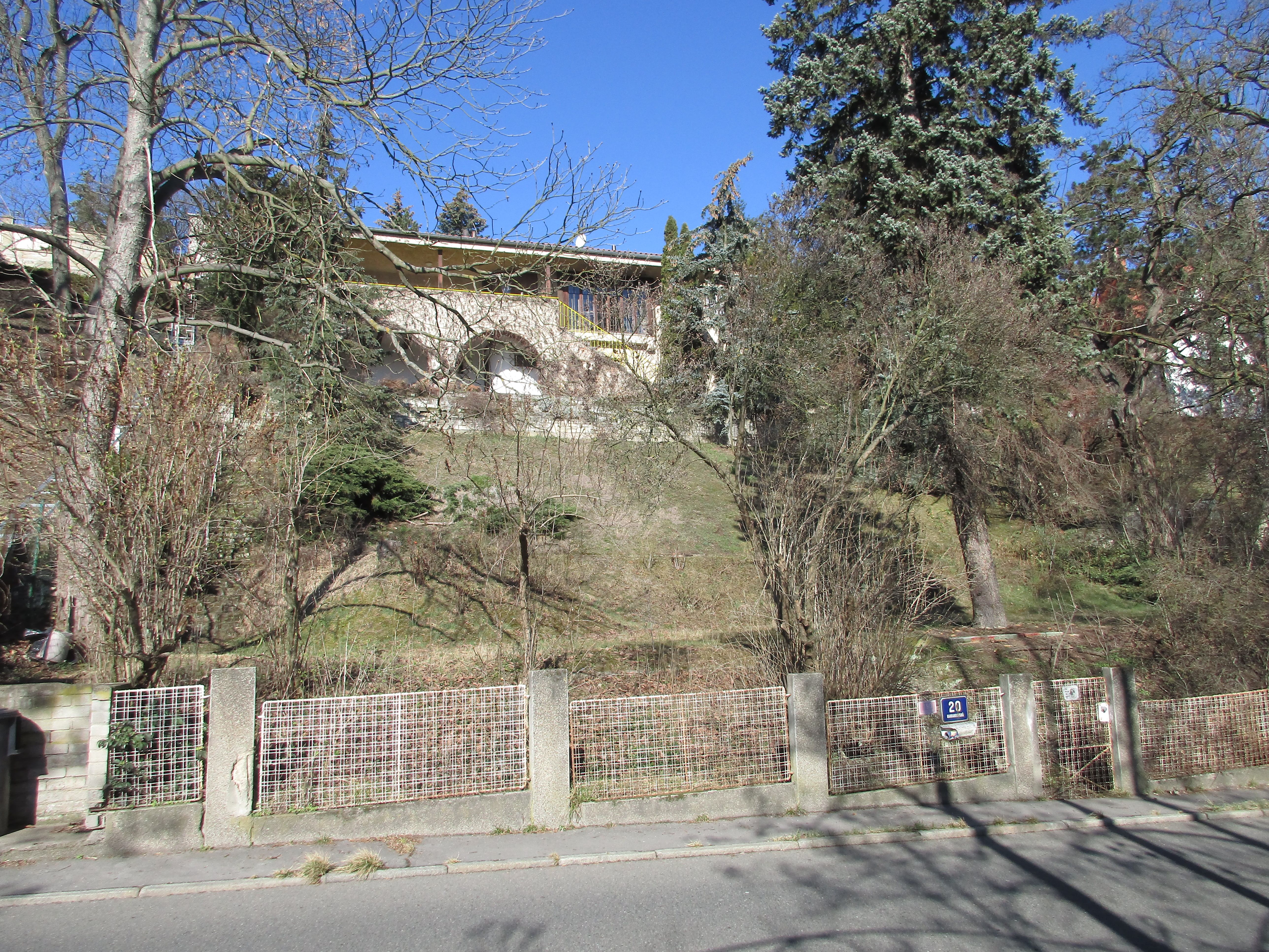 Barrandovská 190/20, Skalní 190/18, Praha 5-Hlubočepy.